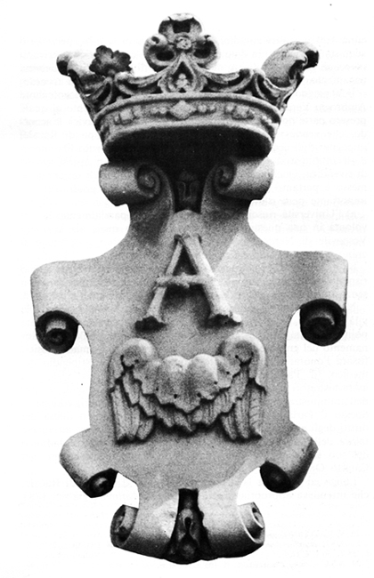 Descrizione= Stemma di Alliste (Lecce) collocato sulla facciata della Chiesa di San Quintino nel 1873, al termine dei lavori di restauro della chiesa che si protrassero per oltre un decennio. Fonte= foto personale Data= 1986 Autore= Antonio47